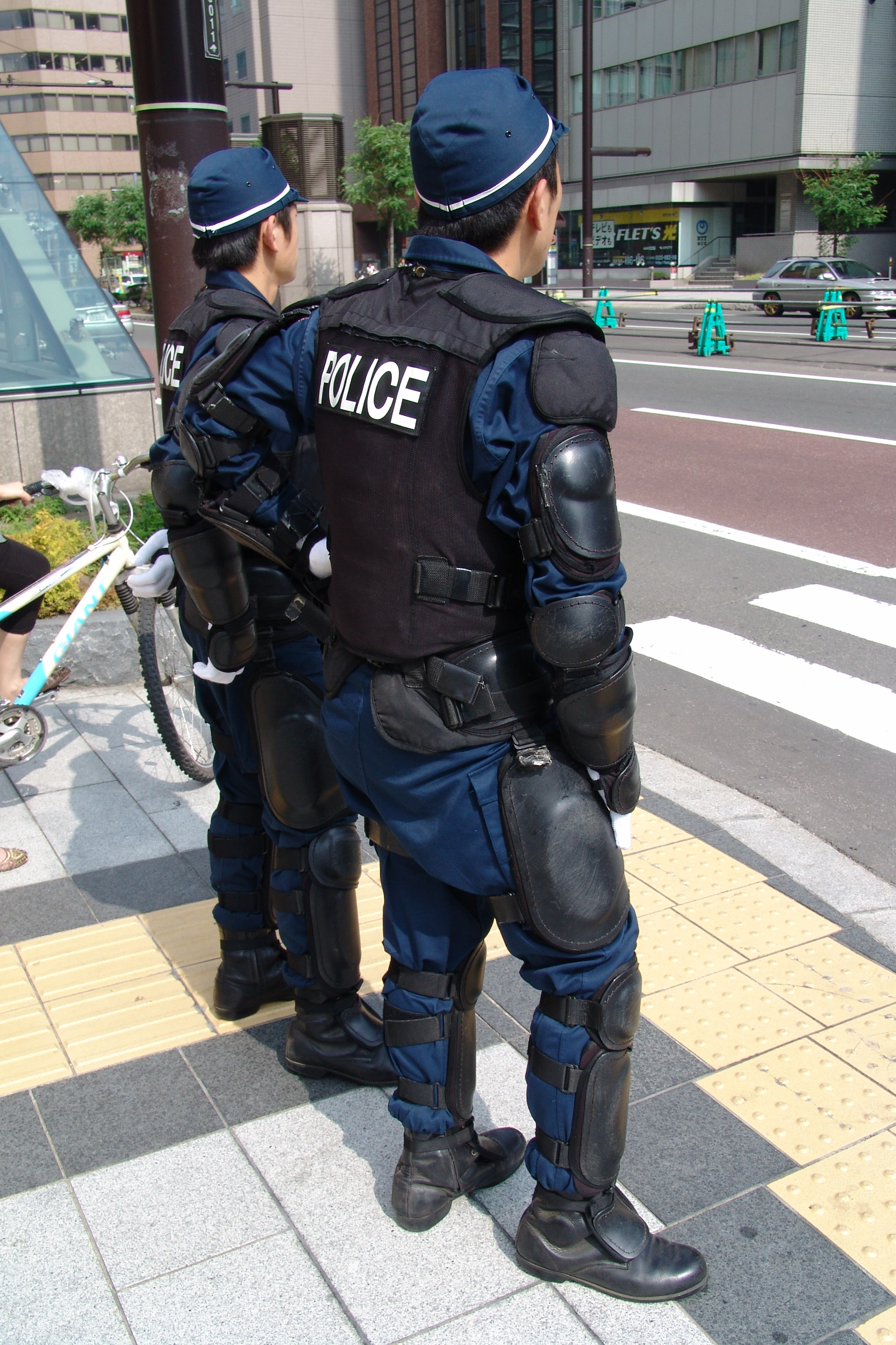 %u3053%u306E%u65E5%u306E%u672D%u5E4C%u306F%u6C17%u6E2928%u5EA6%u3068%u71B1%u3044%uFF11%u65E5%u30C7%u30B7%u30BF%u3002